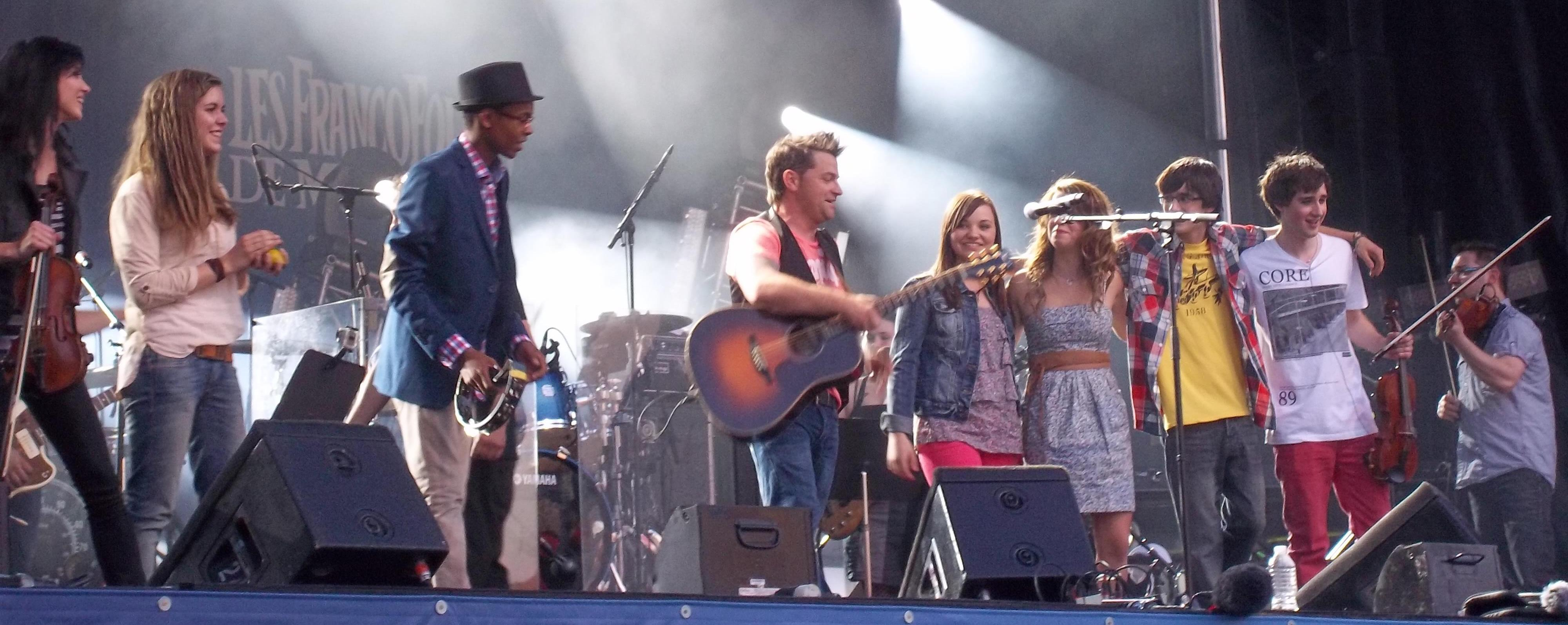 Patrick Groulx a offert une performance à Montréal le 10 juin 2012 dans le cadre des FrancoFolies. Il présente Jam, la relève musicale franco-ontarienne.